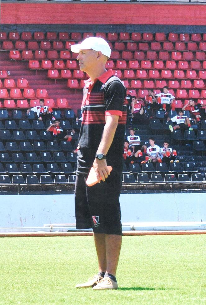 Pablo dirigiendo